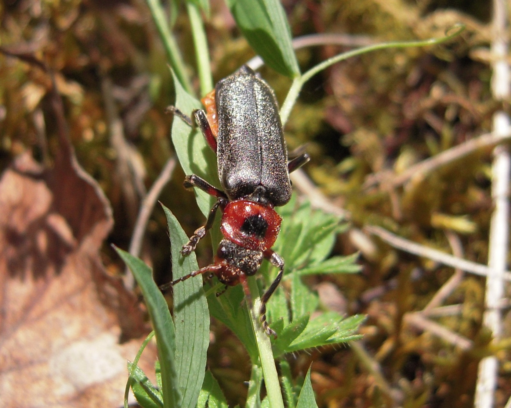 Cantharis rustica (coléoptère) en Forêt Domaniale de Moyeuvre